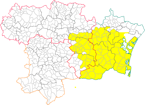 Aire de production de l'AOC Corbières